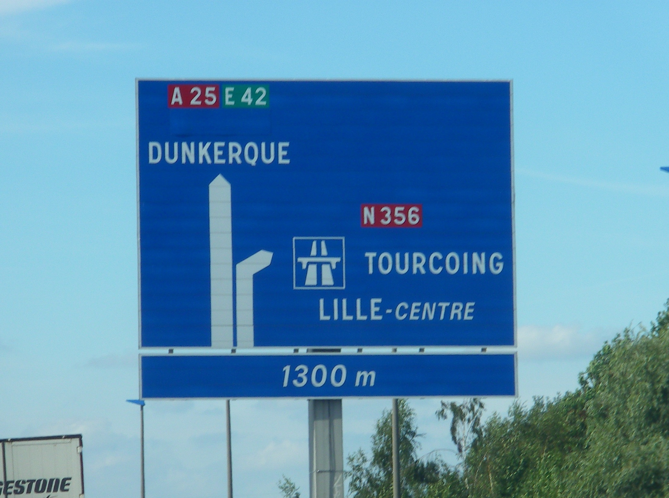 Fin de l'A 1 : bifurcation RN 356 / A 25 à 1300 mètres.